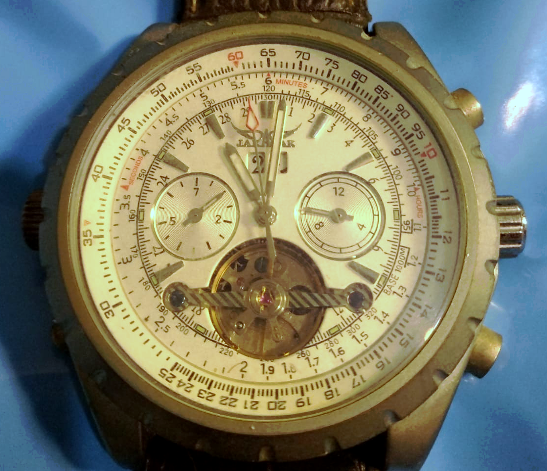 שעון יד מכאני. בתחתיתו חלון שקוף שדרכו נרחה קפיץ השערה.